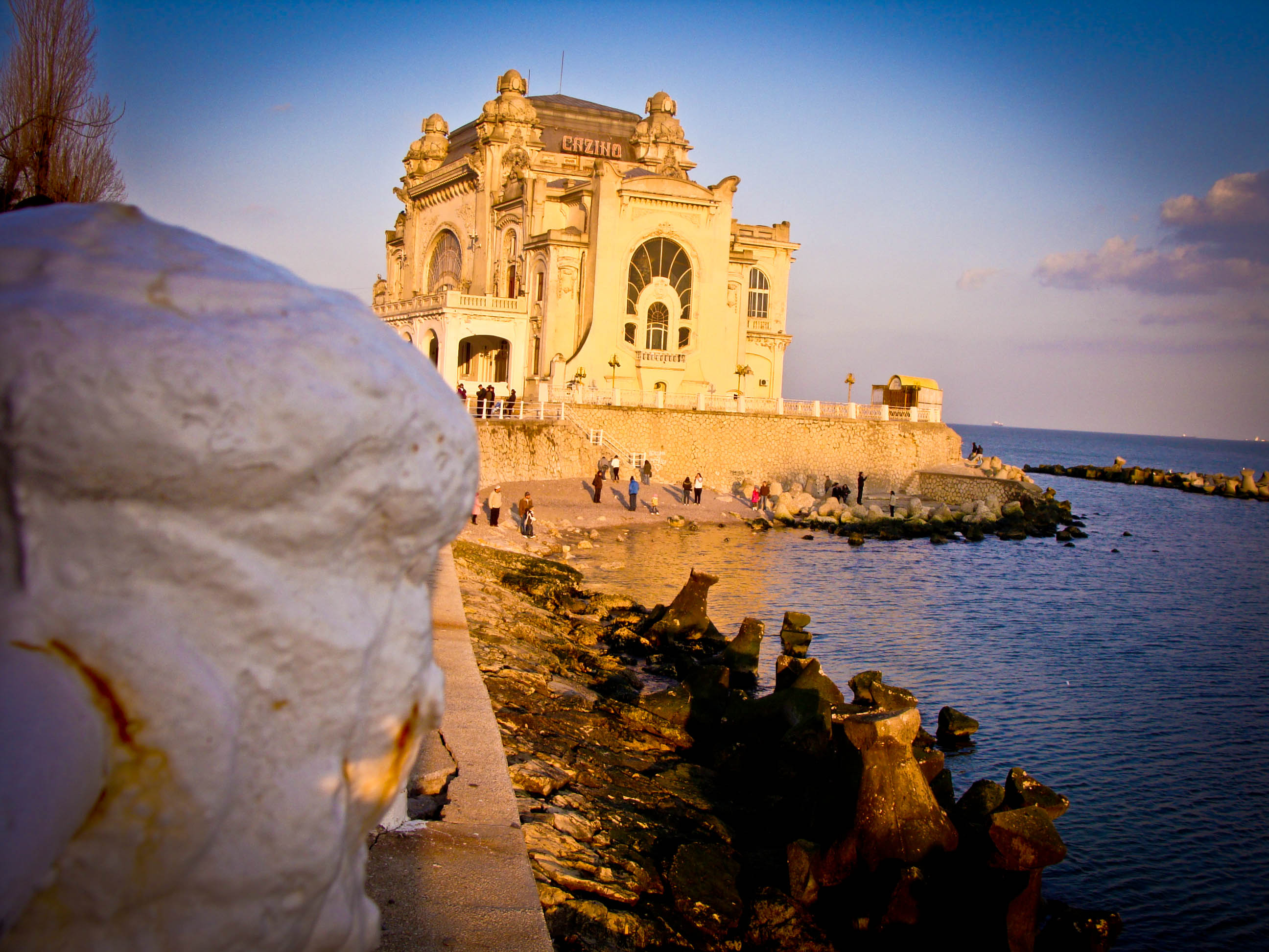 vedere frontala - martie 2010